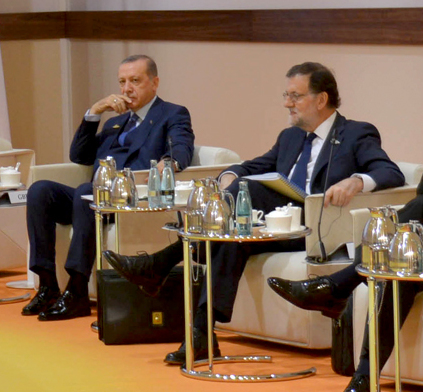 Cumbre de Líderes del G20